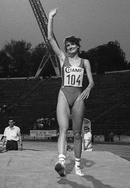 Alina Astafei in Bucharest